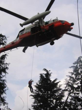 HRS：Helicopter Rescue Swimmer 彼らは、ホイストケーブルに繋がることなく、洋上、艦（船）上及び陸上において機外展開し、遭難者等を救助する救助員である。